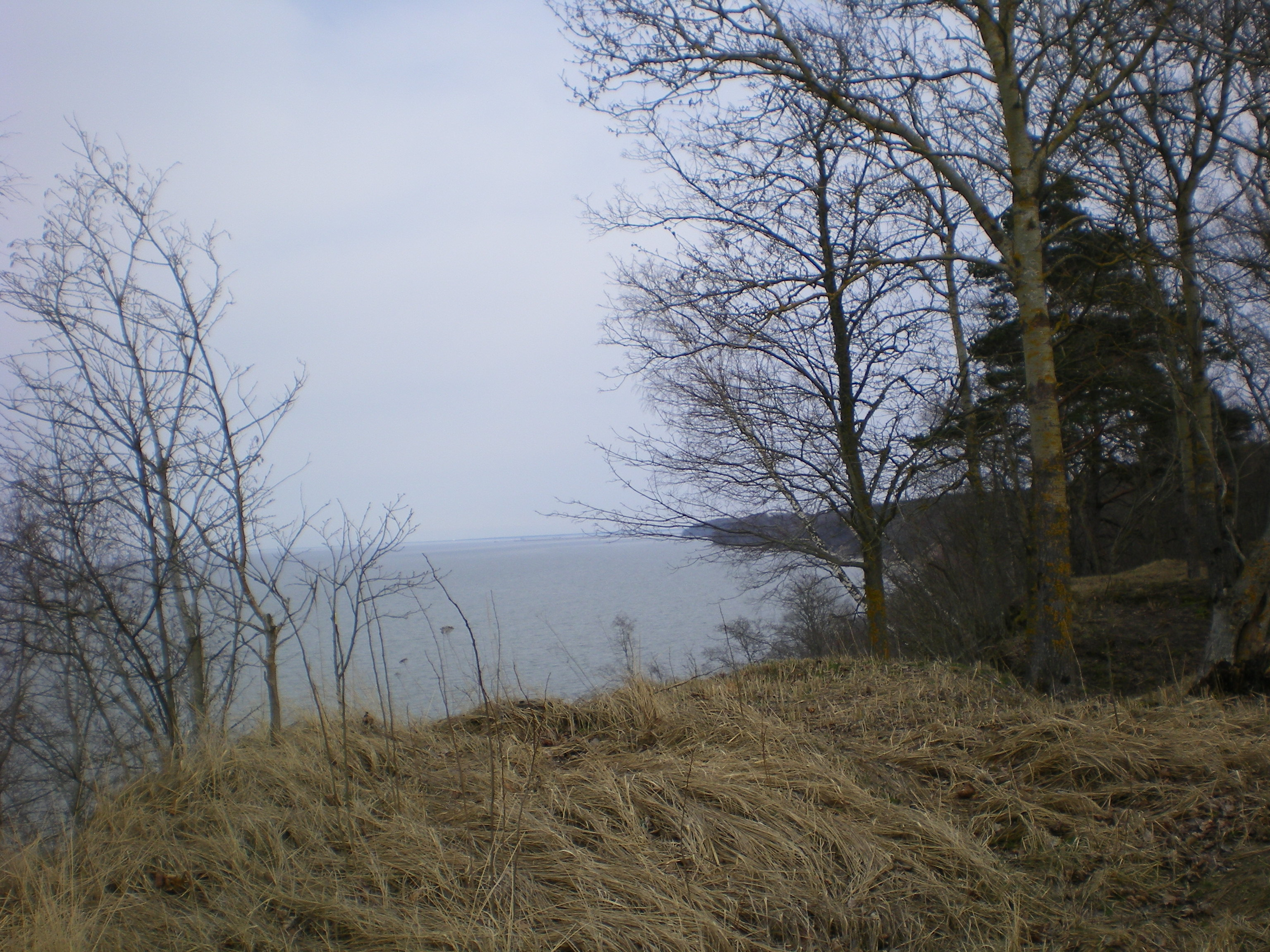 Vaade Pühajõe pangalt Vokal